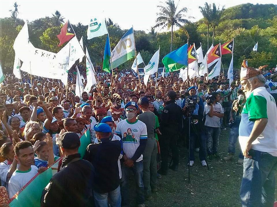 Xanana Gusmão bei einer Wahlkampfveranstaltung der AMP in Oesilo, Oecusse, Osttimor